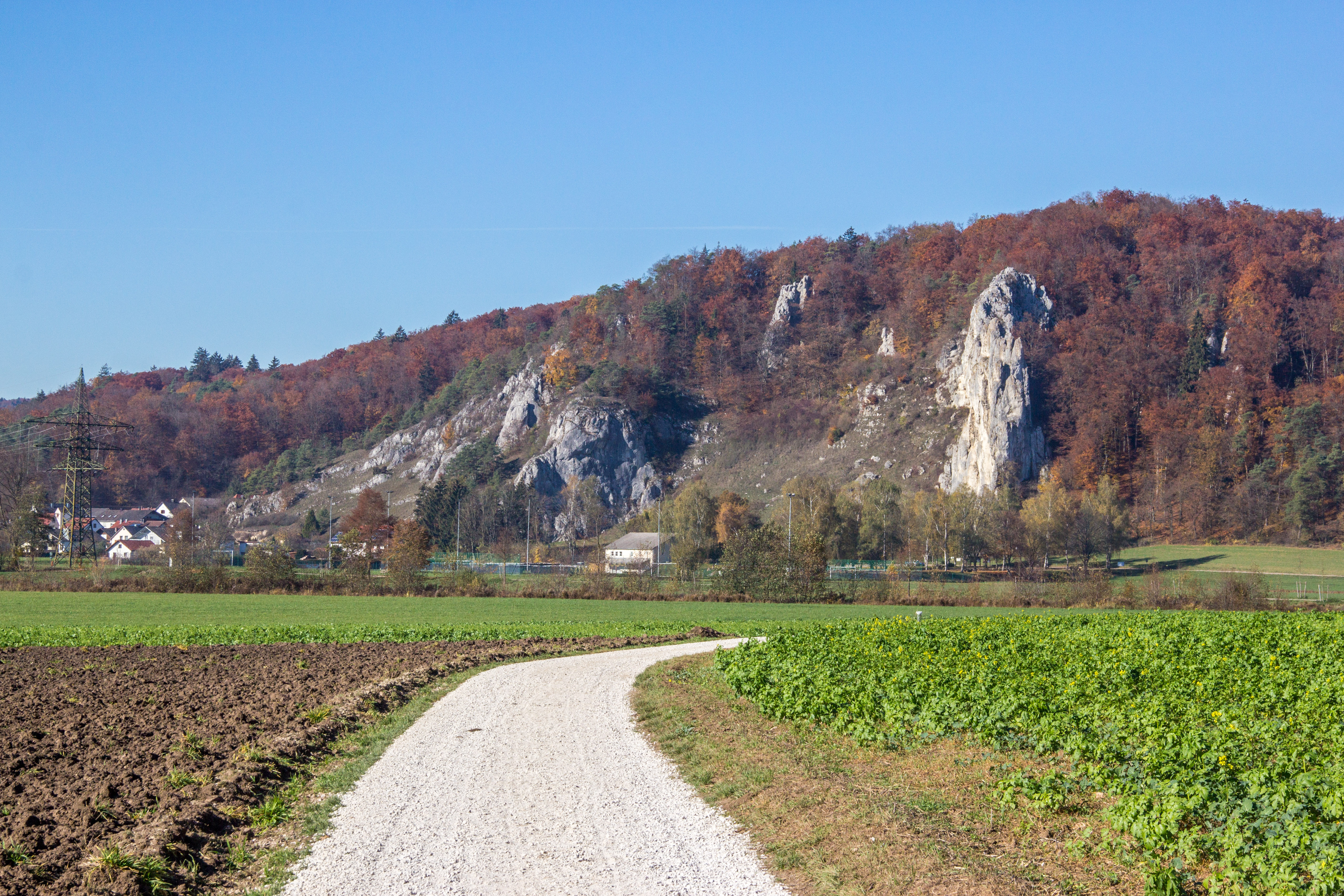 Wellheim, Wellheimer Trockental, Geotop